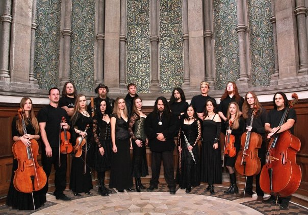 Ally Storch mit Haggard (Promoshoot 2009)